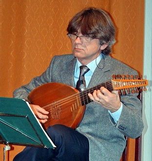 Tadeusz Czechak, Polish musician